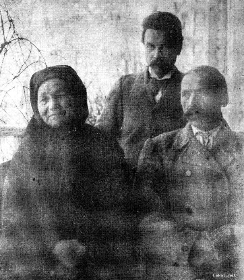 Л. Вітан-Дубейкаўскі з бацькамі ў Дубейкаве. 1904